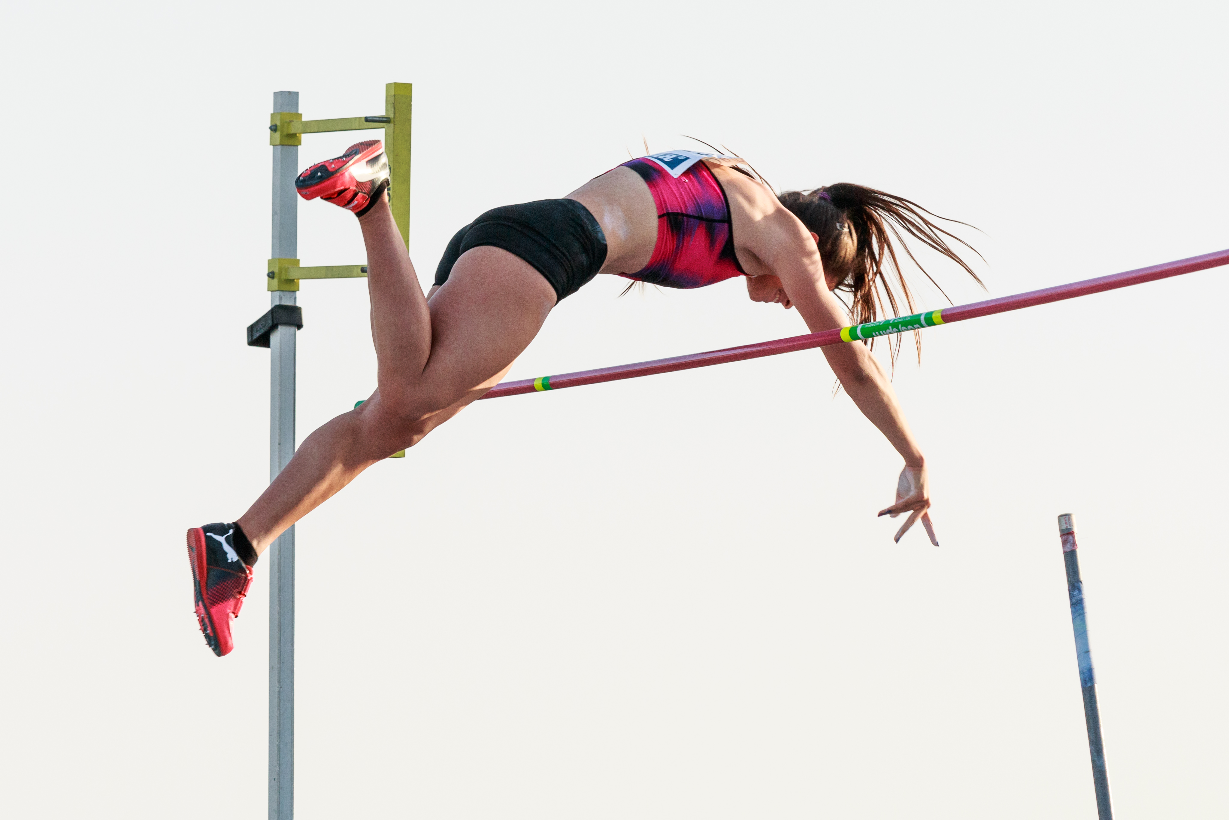 Robeilys Peinado (VEN). Salto con garrocha. IAAF World Challenge. Meeting Madrid 2017. Moratalaz, Madrid.